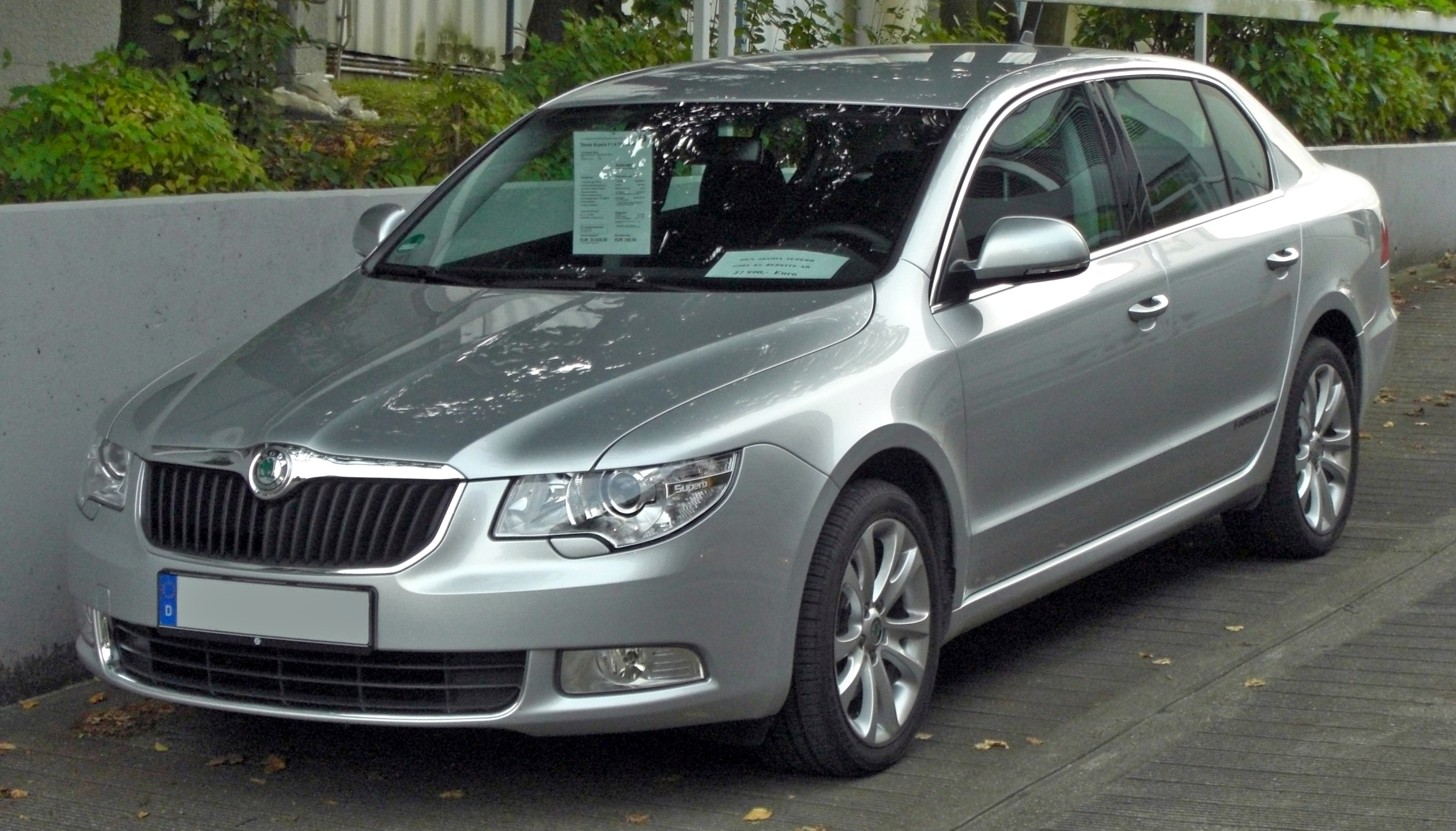 Skoda Superb II